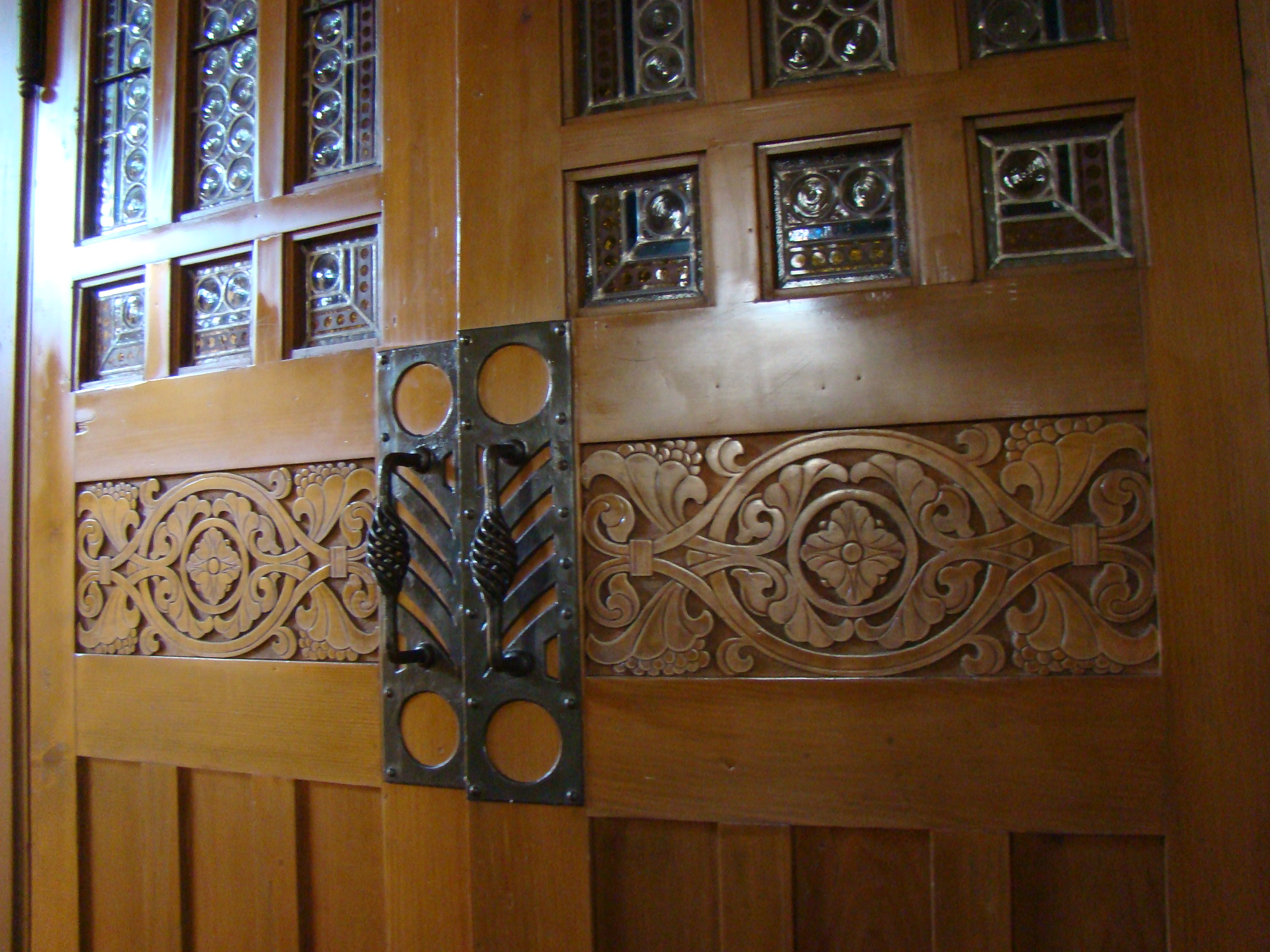 Johanneskirche in Untergruppenbach, Bauschmuck. Foto: Peter Schmelzle (November 2011).